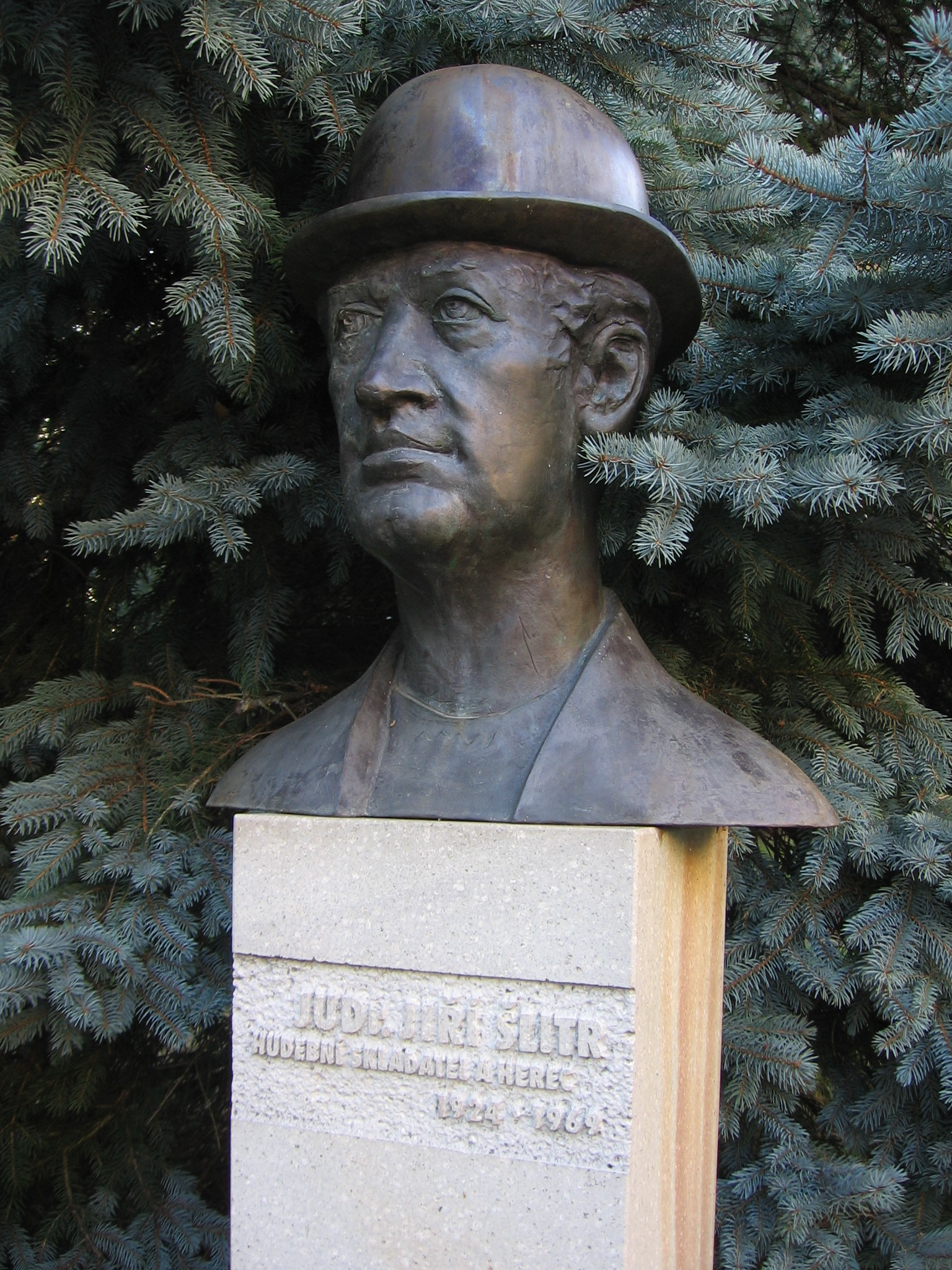 Busta Jiřího Šlitra v parku u gymnázia v Rychnově nad Kněžnou